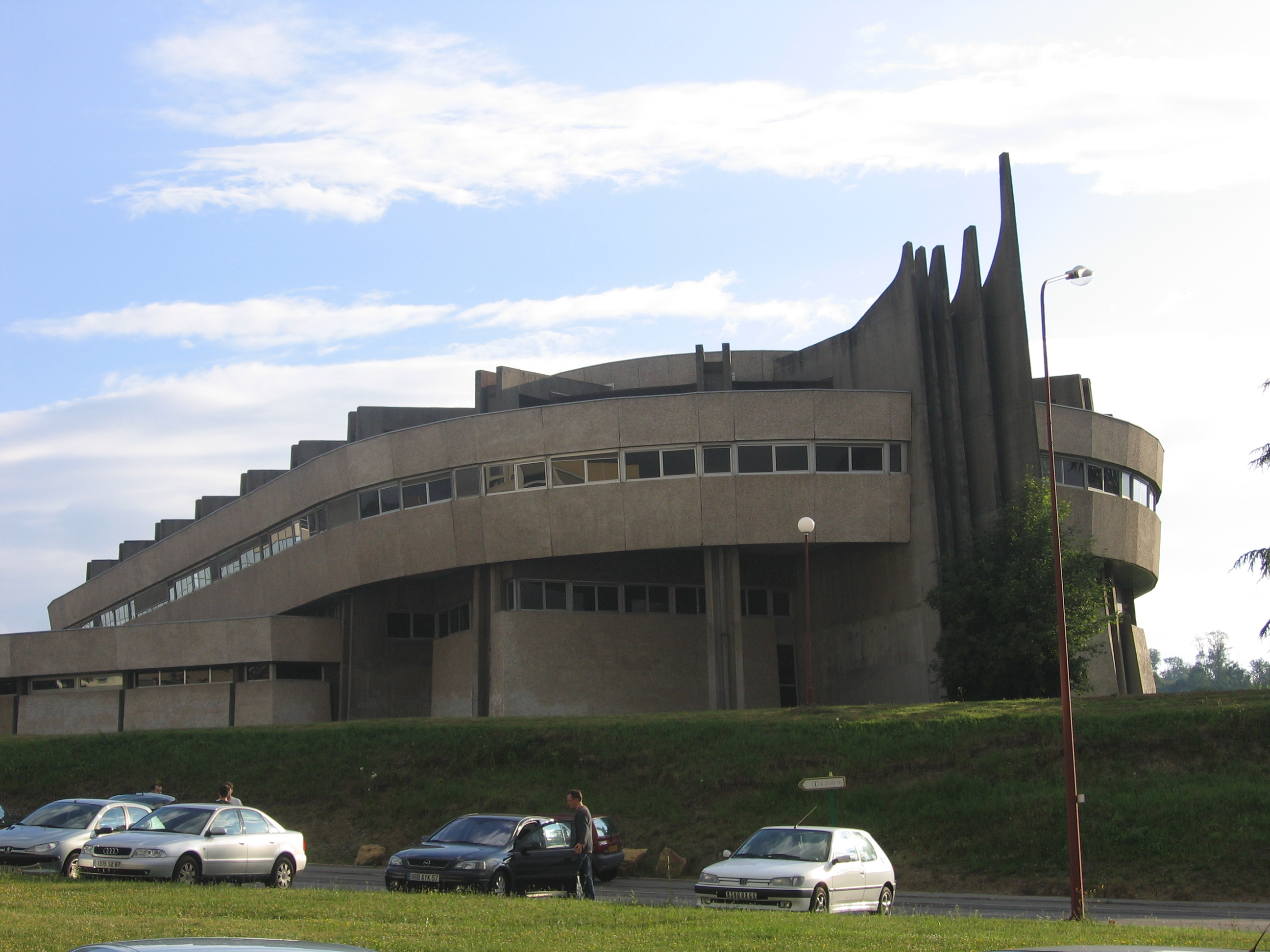 Bibliothèque Universitaire du Campus Sciences et Techniques, Université Henri Poincaré, Nancy, France